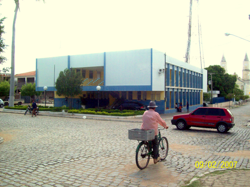 Prefeitura da cidade de Pombal, Paraíba, no bairro centro.